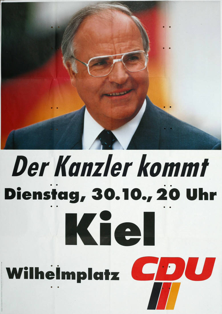 Der Kanzler kommt ... CDU Abbildung: Porträtfoto Plakatart: Ankündigungsplakat Auftraggeber: CDU-Bundesgeschäftsstelle, Abt. Öffentlichkeitsarbeit, Konrad-Adenauer-Haus, Bonn Drucker_Druckart_Druckort: Greven & Bechtold GmbH, Hürth Objekt-Signatur: 10-001 : 3563 Bestand: Plakate zu Bundestagswahlen (10-001) GliederungBestand10-18: Plakate zu Bundestagswahlen (10-001) » Die 12. Bundestagswahl am 2. Dezember 1990 » CDU » Ankündigungsplakate Lizenz: KAS/ACDP 10-001 : 3563 CC-BY-SA 3.0 DE